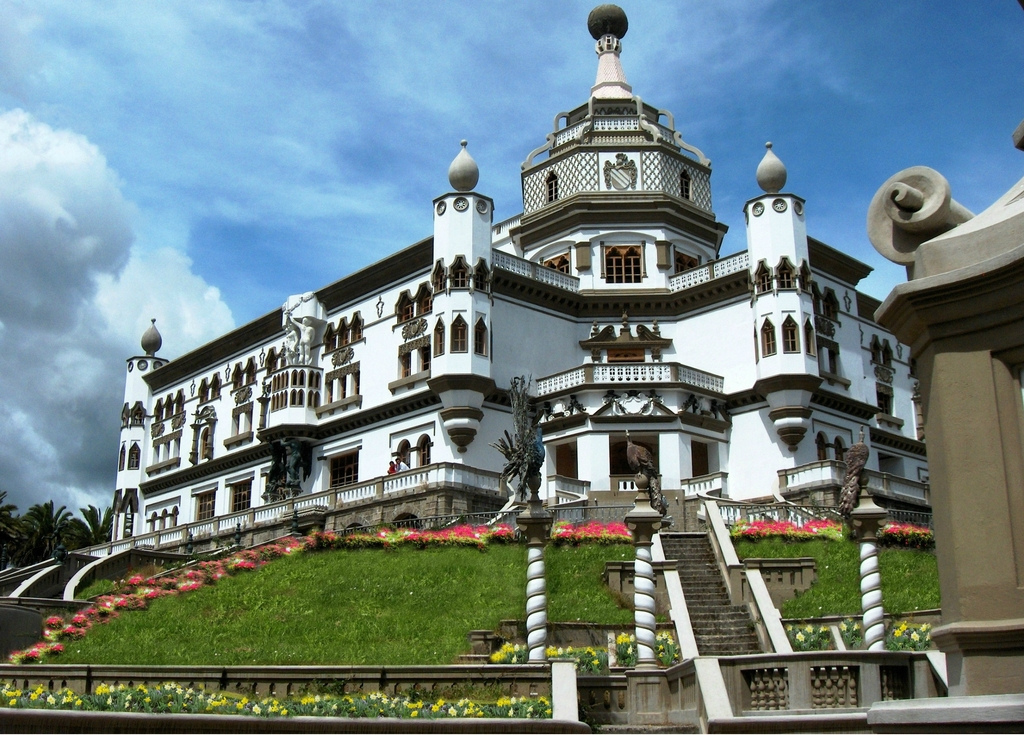 Pabellón principal del Castillo de Guachalá, Cayambe.